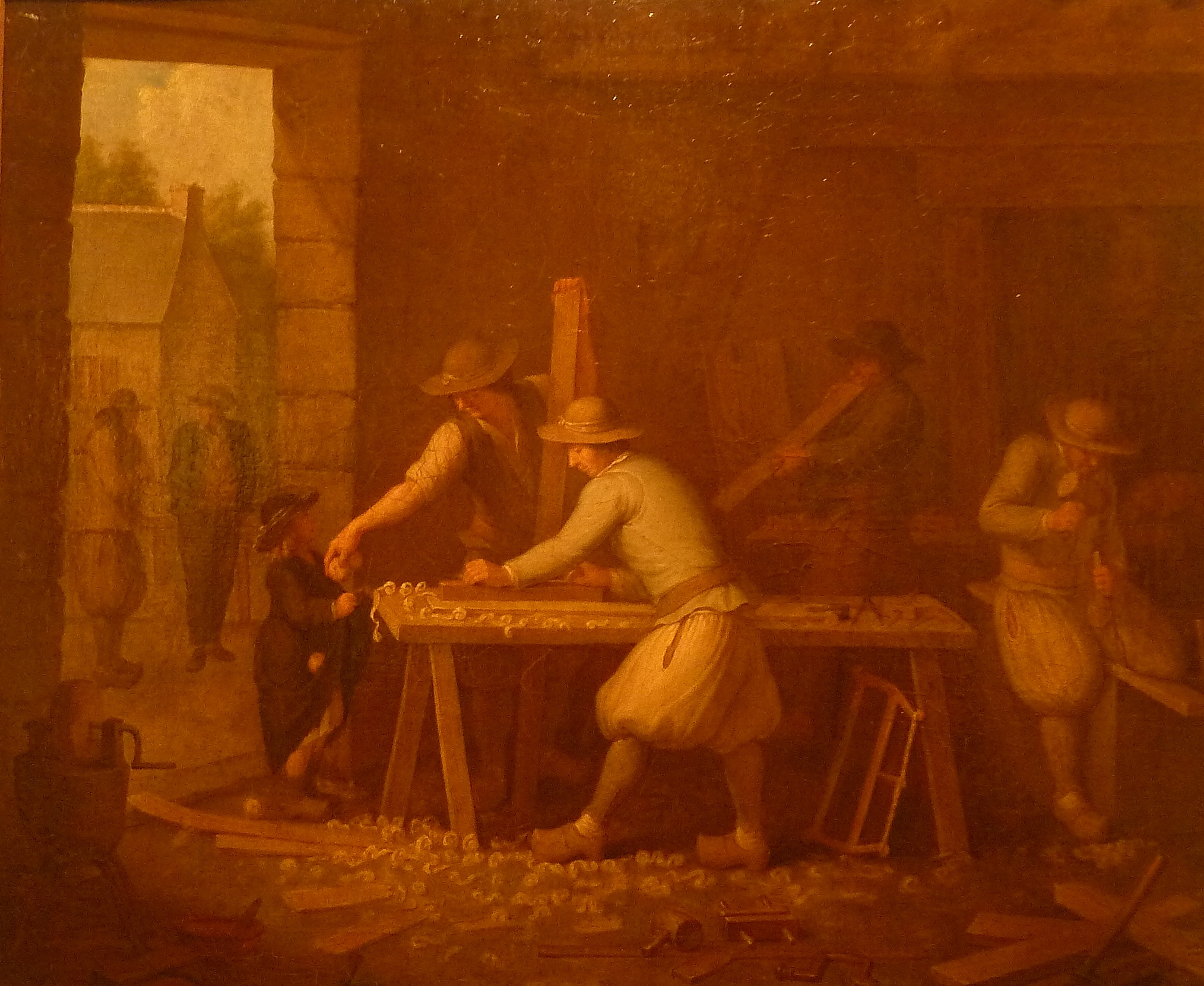 Olivier-Stanislas Perrin : L'atelier du menuisier (huile sur toile, début XIXe siècle, musée d'art et d'histoire de Saint-Brieuc)